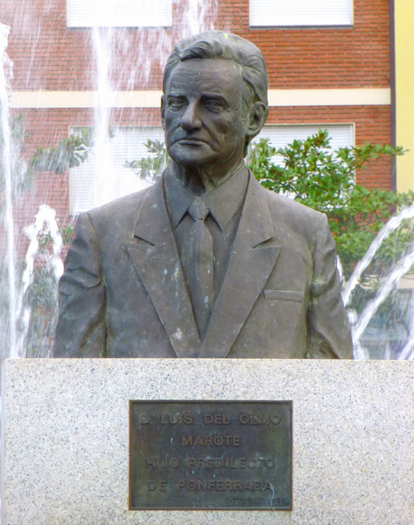 Plaza de Luis del Olmo (Ponferrada, province of León).